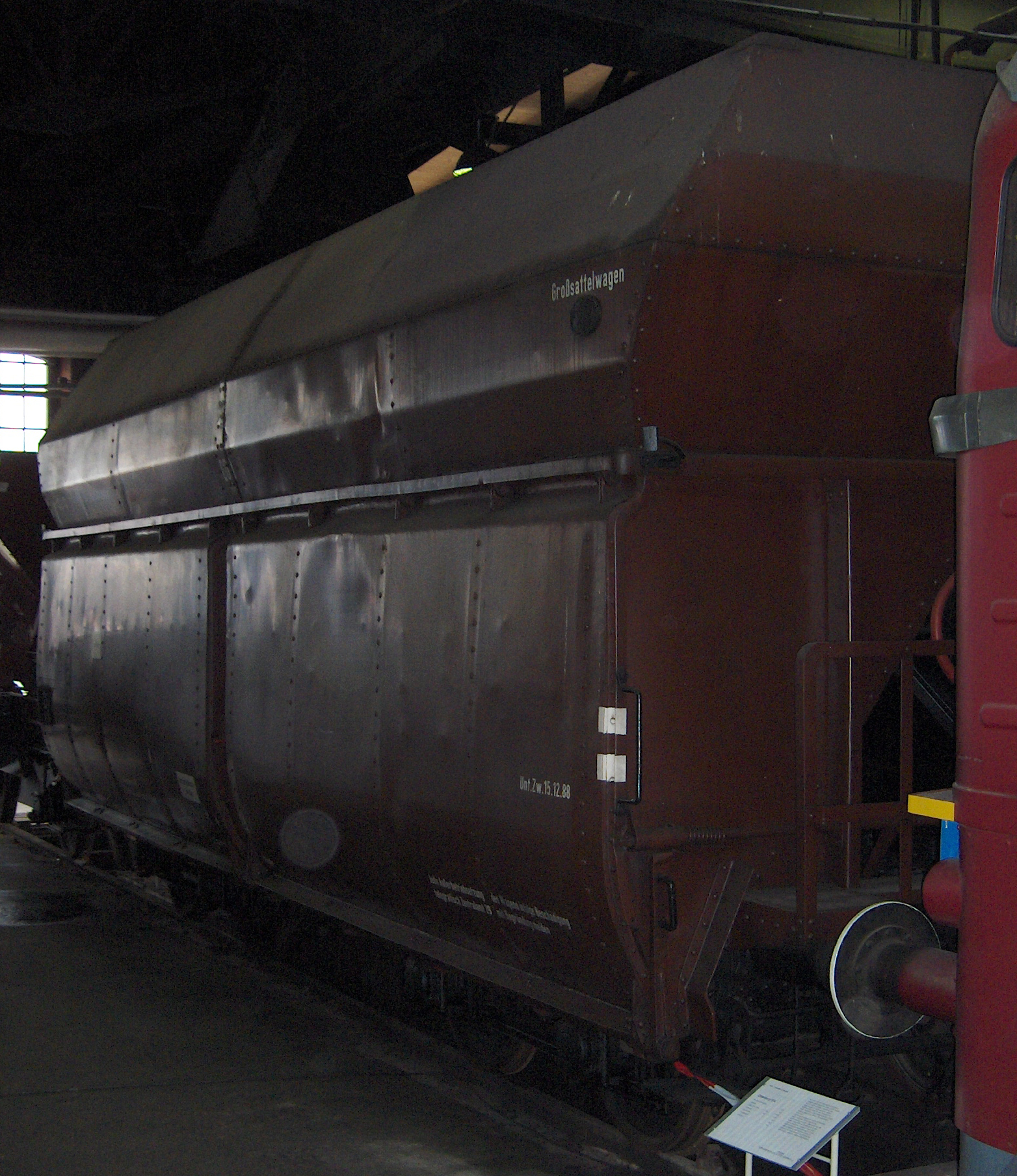 Großsattelwagen "Oldenburg 574" der Deutschen Reichsbahn, gebaut 1928 von Orenstein & Koppel. Fotografiert im Verkehrsmuseum Dresden.